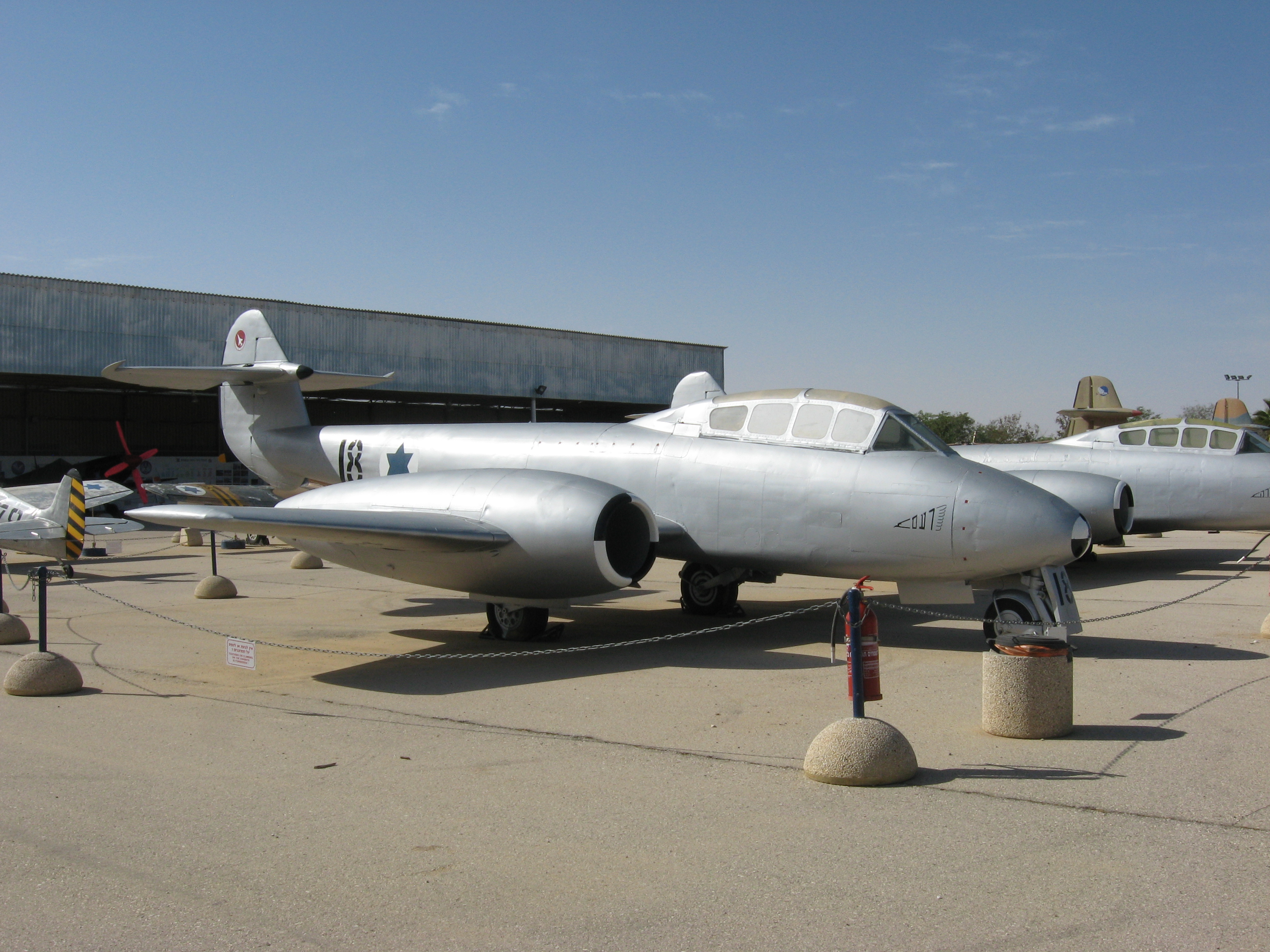 Gloster Meteor 18 "Ra'am" (Thunder) at the Israeli Air Force Museum in Hatzerim